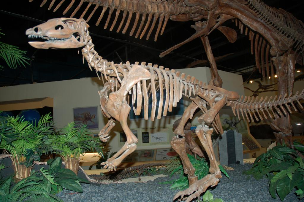 Ornithopoda csontváz